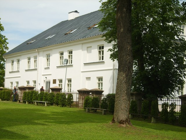 Telšių kunigų seminarijos propedeutinis kursas Žemaičių Kalvarijoje